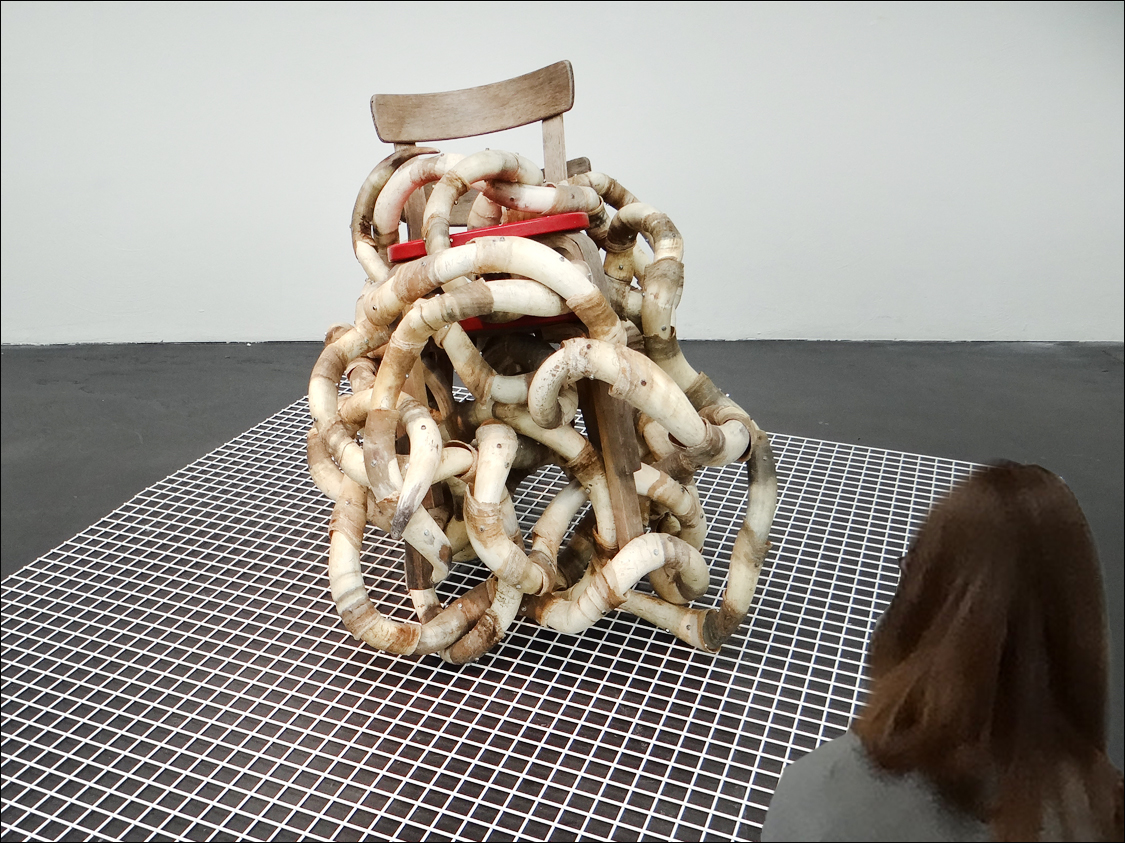 Au premier plan, Territory (1999) de l'artiste finlandais Kaisu Koivisto (1962) Cette oeuvre, qui appartient aux collections du Kiasma, confronte le territoire esthétique, symbolique ou imaginaire qui entoure une création humaine reconnue, comme l'est la chaise d'Alvar Aalto, le célèbre artiste-designer-architecte finlandais et un territoire qu'un animal, évoqué par les cornes emboitées les unes dans les autres, défend autour de lui pour subsister. La combinaison inattendue de formes créées par la Nature et par l'Homme est une constante dans les oeuvres de cet artiste. Site de l'artiste L'exposition Camouflage fait partie de l'opération WDC 2012 : Helsinki, Capitale mondiale du design (World Design Capital Helsinki) Site du musée